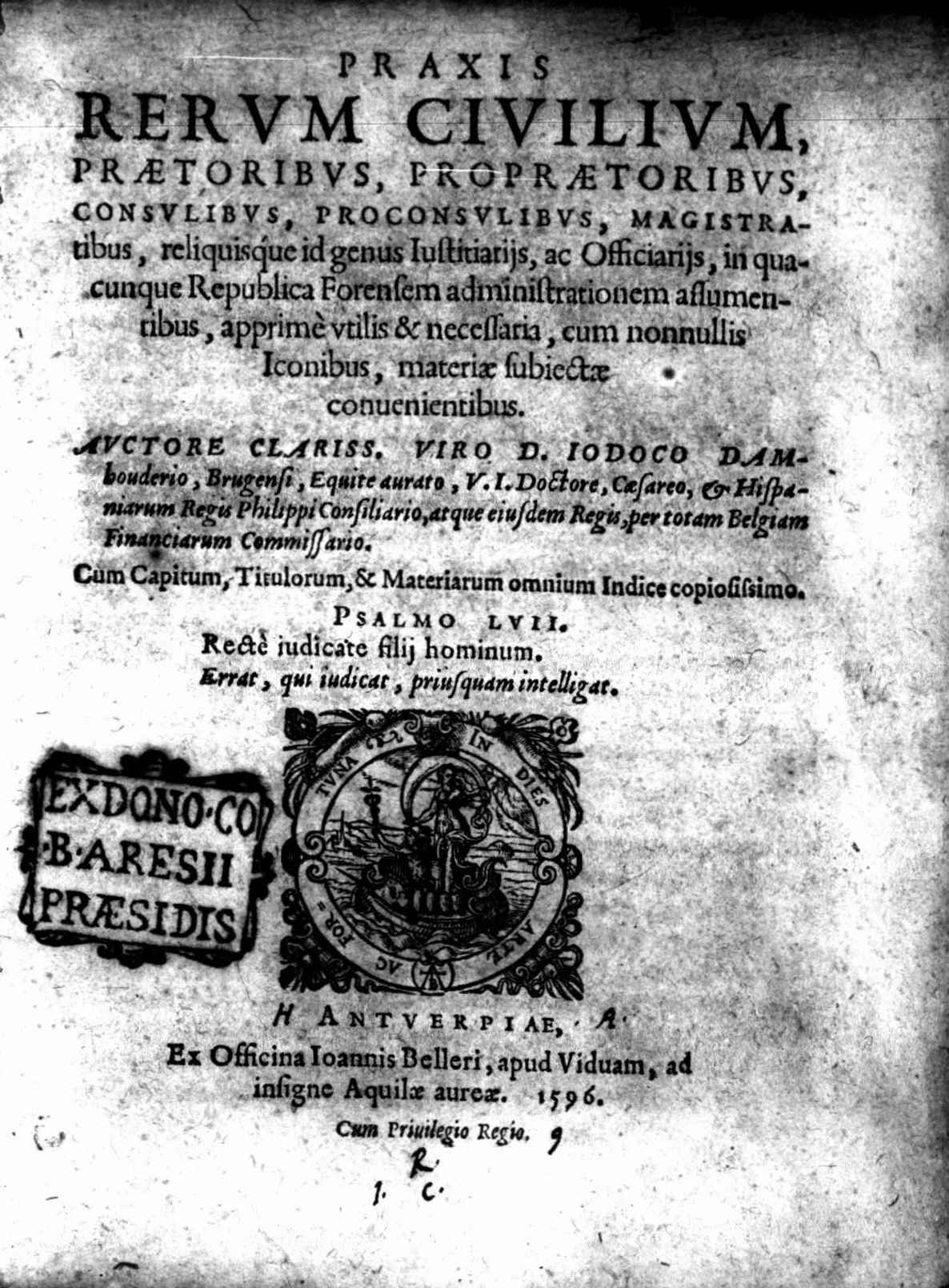 Frontespizio